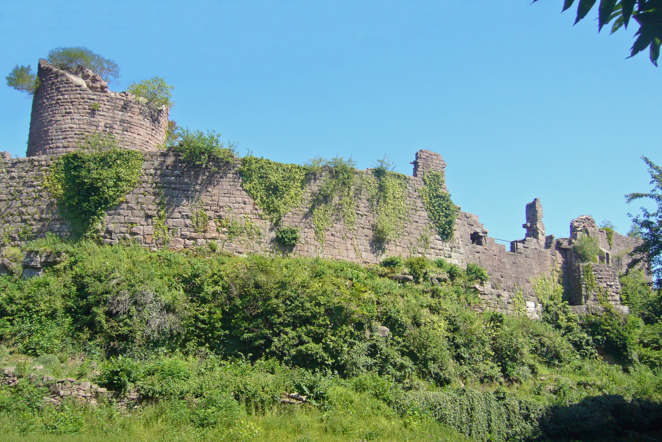 Frankenbourg 058.JPG